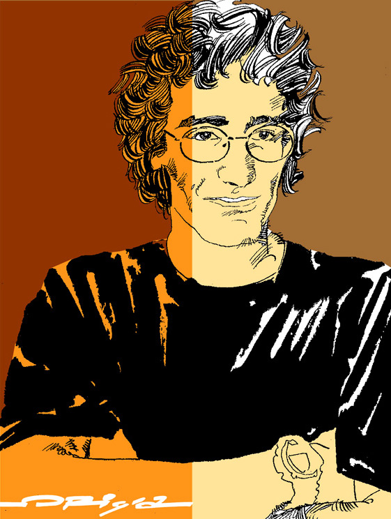 Alberto Ponticelli, fumettista italiano, ritratto di Graziano Origa, 1995